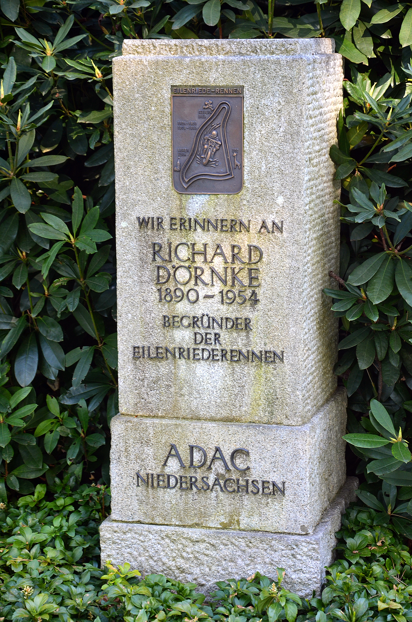 Vom ADAC-Niedersachsen gesetzter Gedenkstein für den Begründer des Eilenriederennens Richard Dörnke auf dem Stadtfriedhof Engesohde in Hannover, Abteilung A 25 ...